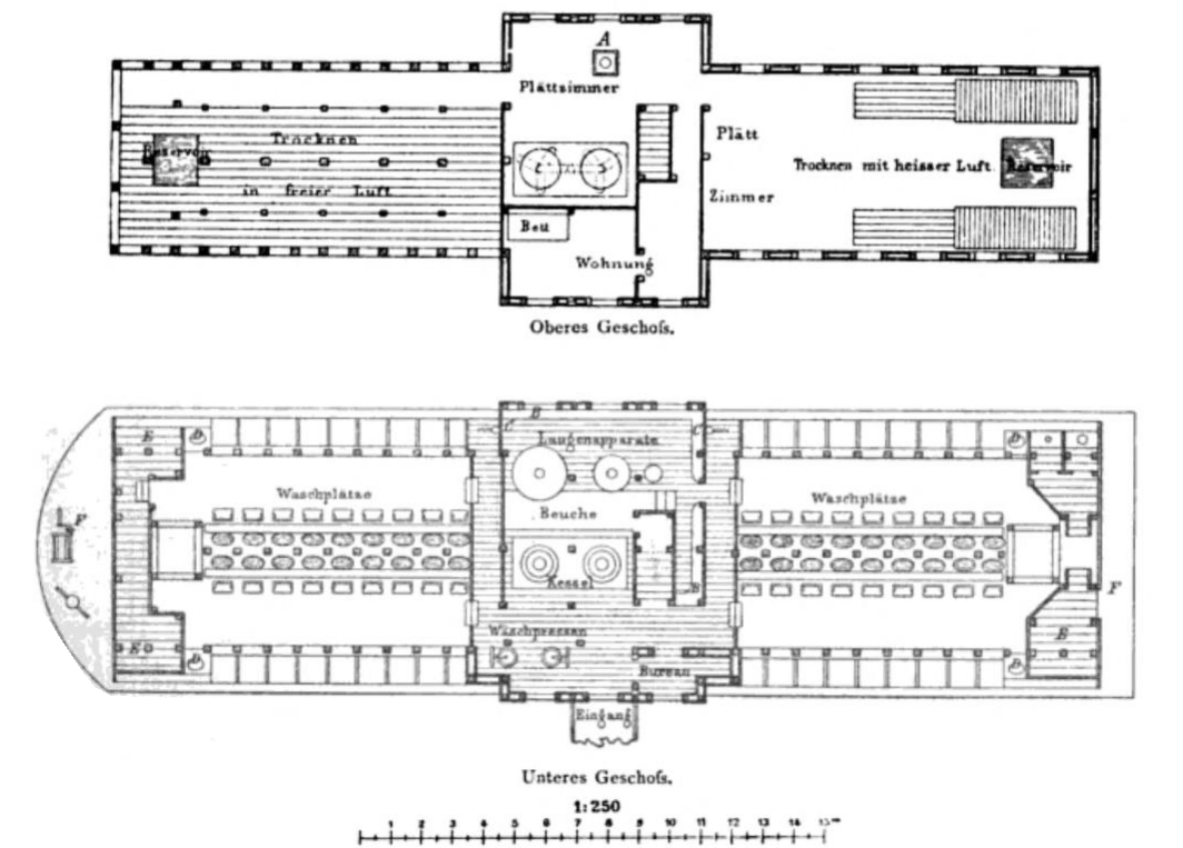 Darstellung eines Waschschiffs in Frankreich